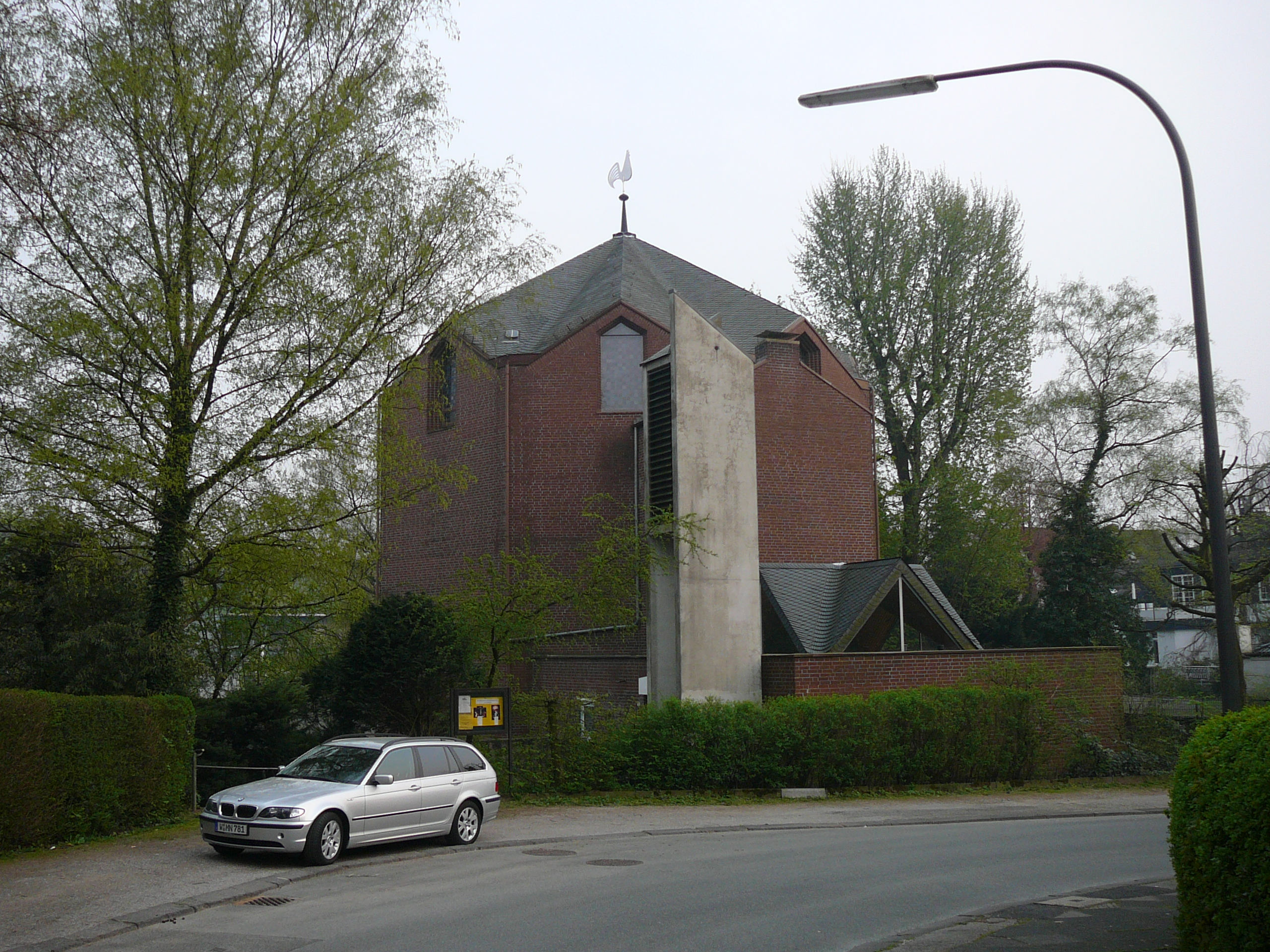 Beethovenstraße, Wuppertal